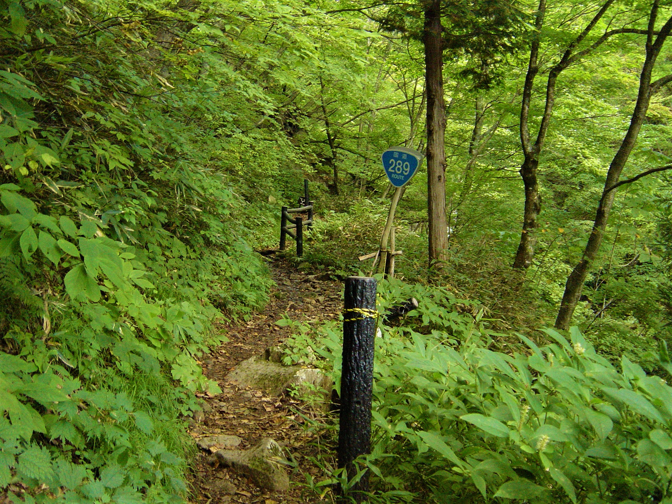 旧国道289号甲子峠登山道国道